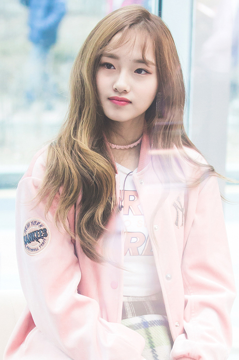 180116 팩트인스타